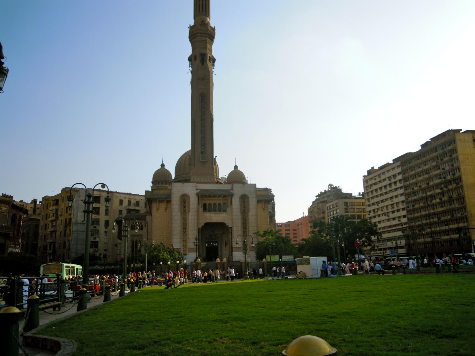 مسجد الفتح بالقاهرة